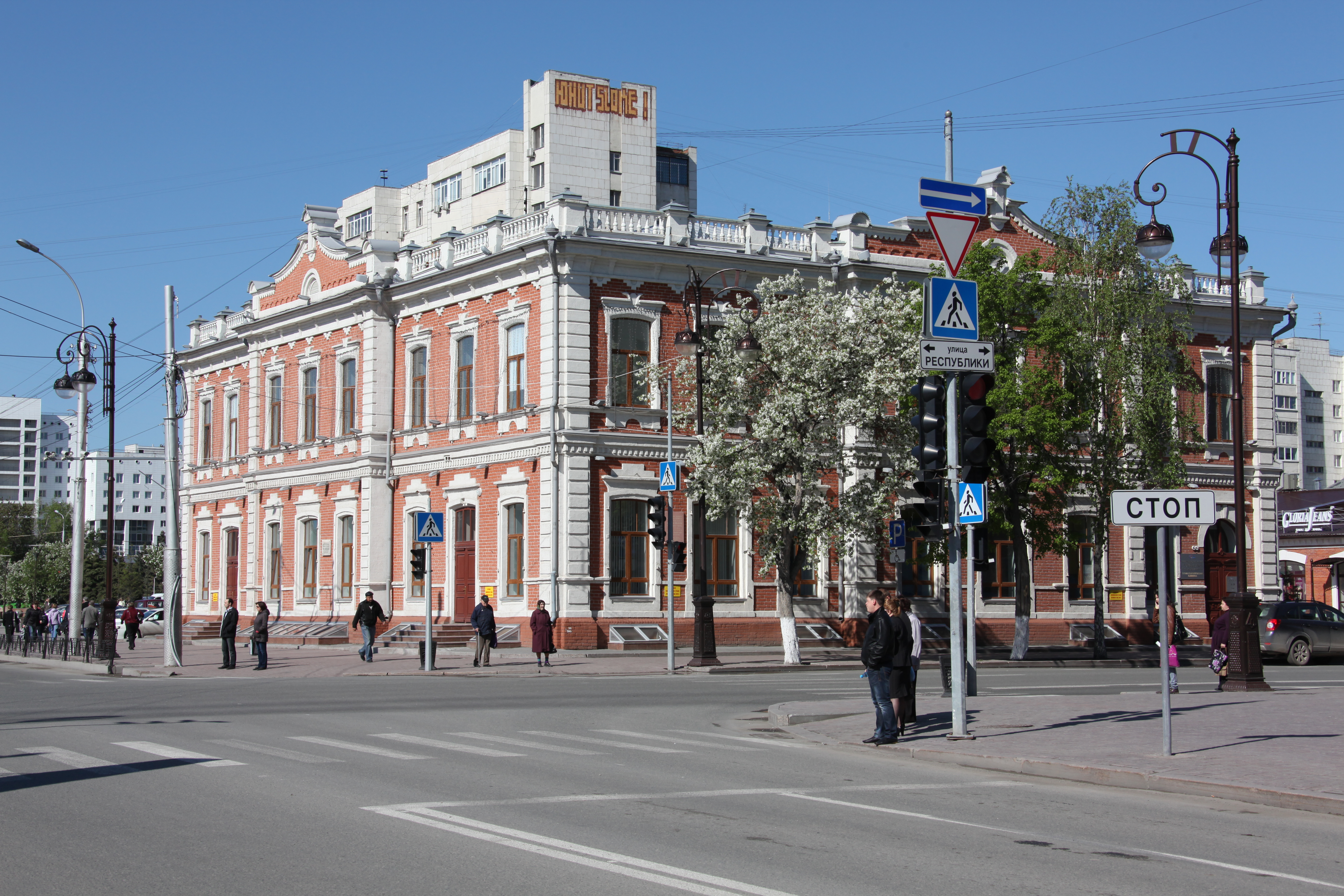 Domo ĉe angulo de stratoj Respubliko 44 kaj Pervomajskaja 12. Tjumeno, Rusio.